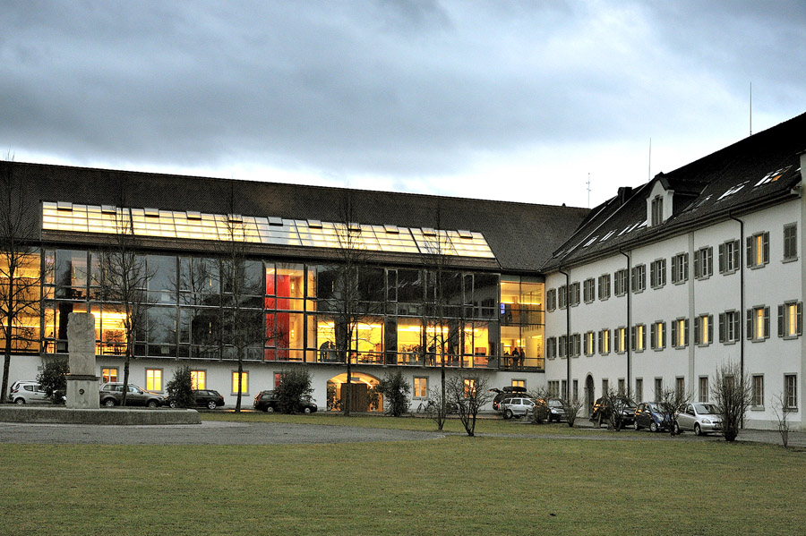 Außenaufnahme des Collegium Bernardi Neubaus